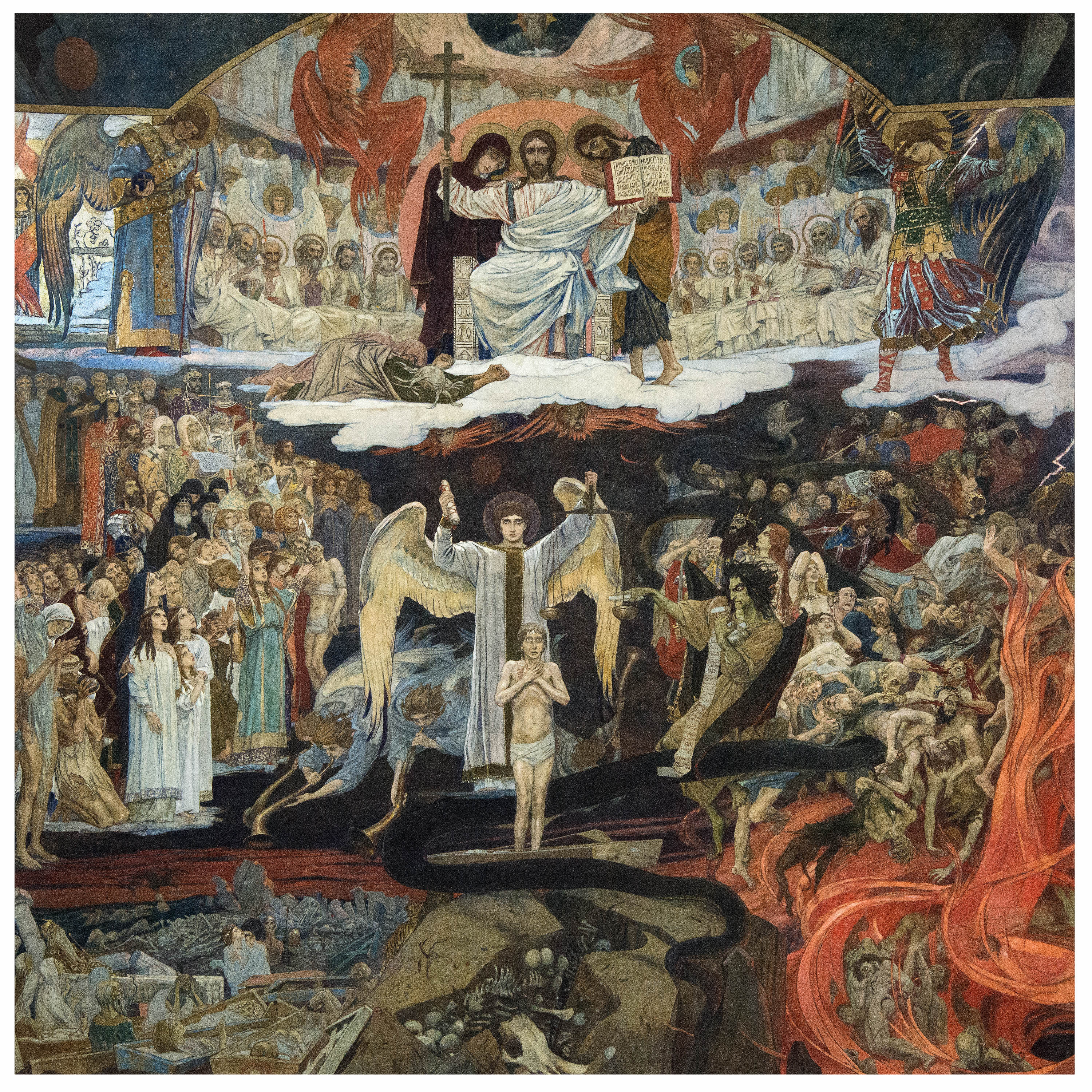 Viktor Vasnetsov. The last judgement. 1904. Oil on canvas 690*700 Museum of Architecture and Art Vladimir масло, холст Размер: 700x680 Место создания: Россия Номер в Госкаталоге: 2349079 Номер по ГИК (КП): В-4533 Инвентарный номер: Ж-1366 Местонахождение Федеральное государственное бюджетное учреждение культуры "Государственный Владимиро-Суздальский историко-архитектурный и художественный музей-заповедник"